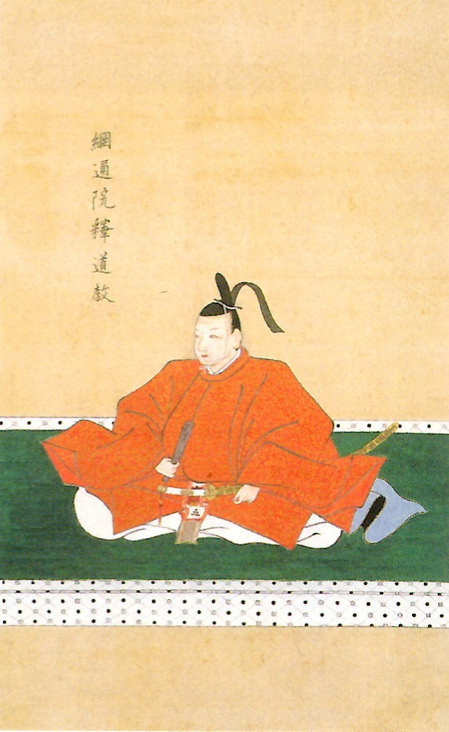 渡辺綱通の肖像。